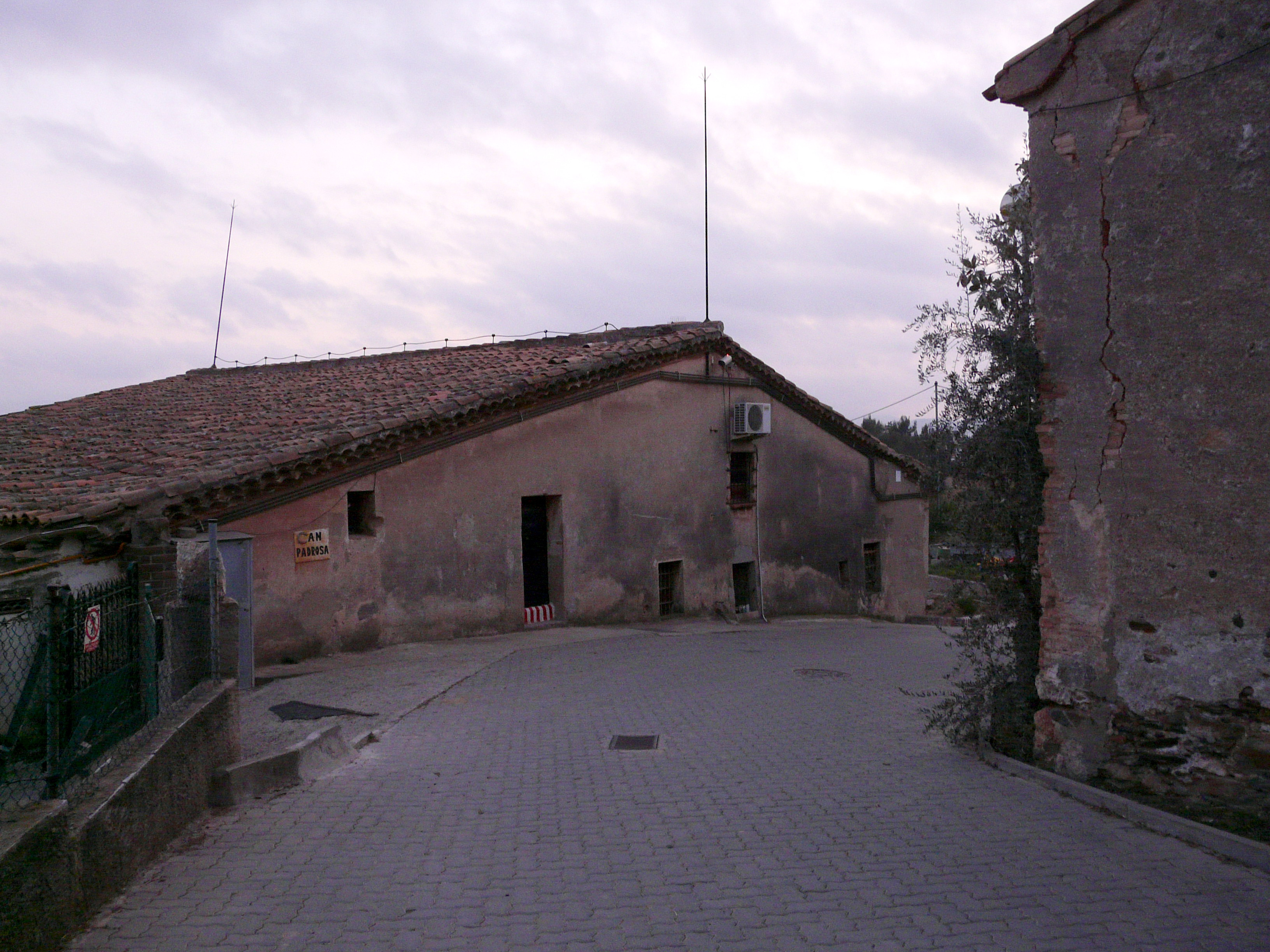 Can Padrosa (Sant Just Desvern) Object location41° 23′ 37″ N, 2° 04′ 39″ E